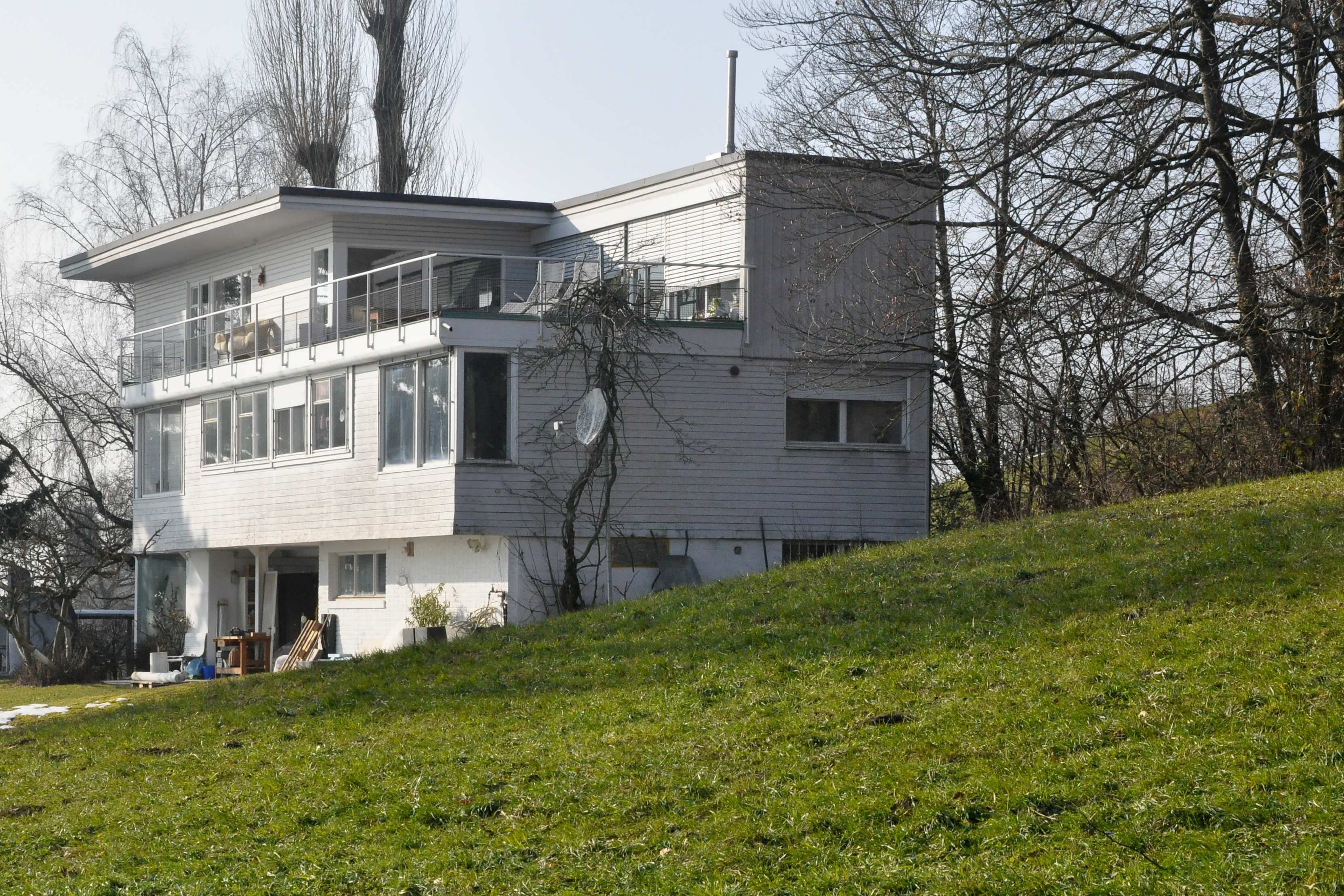 Haus Schlehstud, Architekt: Hans Fischli, Obermeilen, Schweiz. 1933